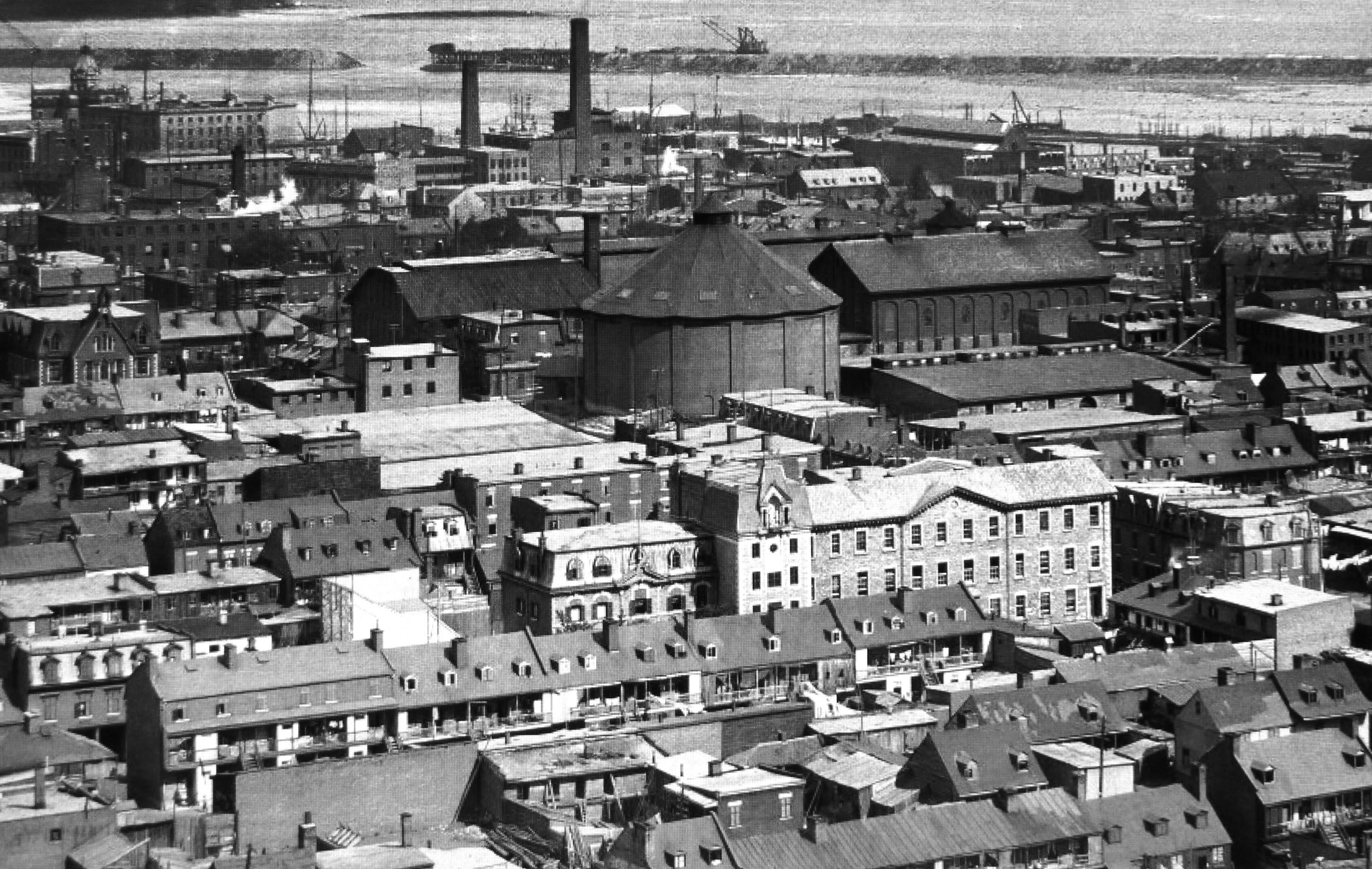 Archives du Musée McCord / Studio Notman (détail). D'une série panoramique réalisée depuis le haut de la cheminée de la Montreal Street & Railway. Vue étonnante sur Griffintown disparu. L'école Ste-Anne sur la rue Murray.